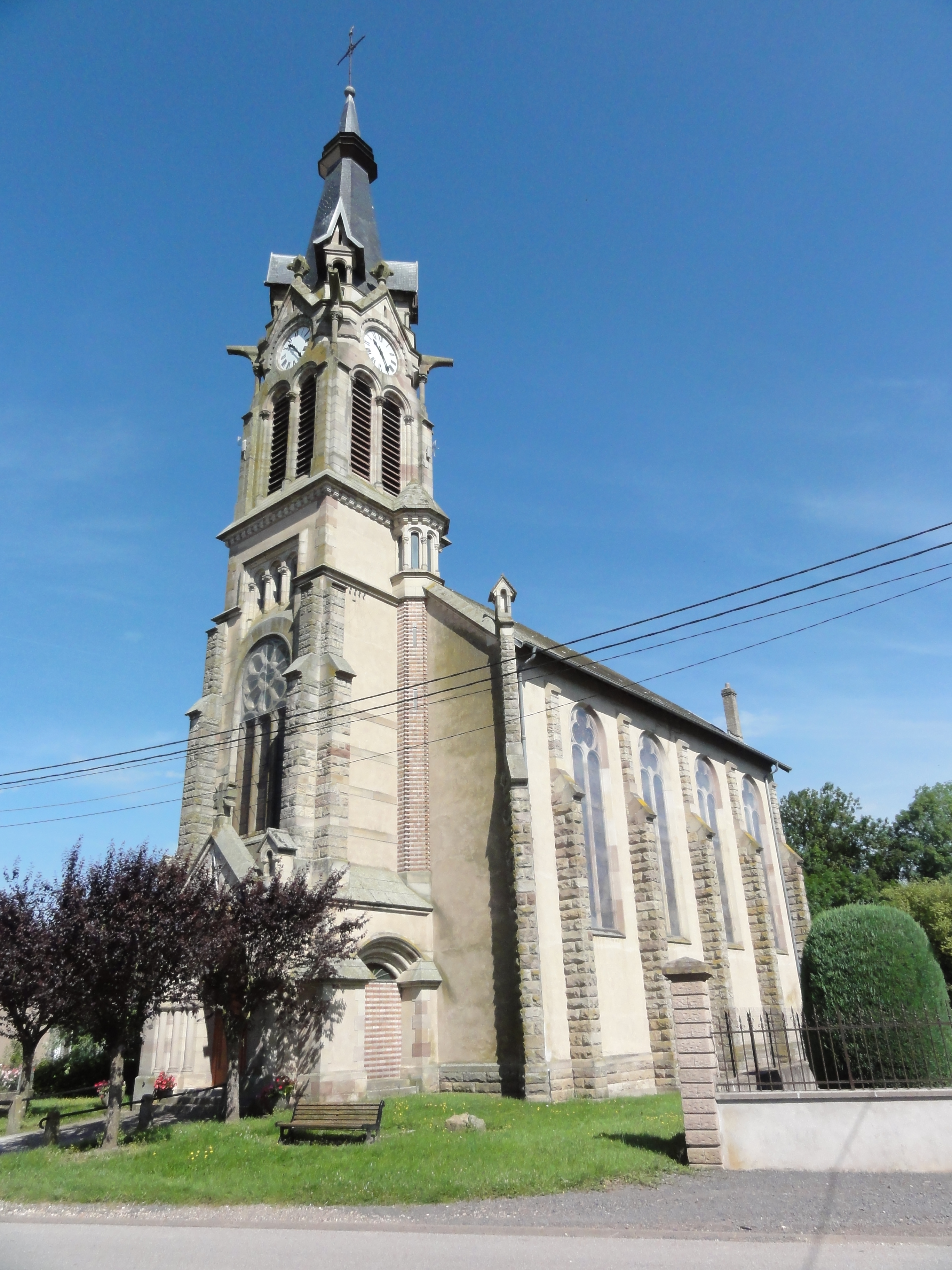 Fenneviller (M-et-M) église